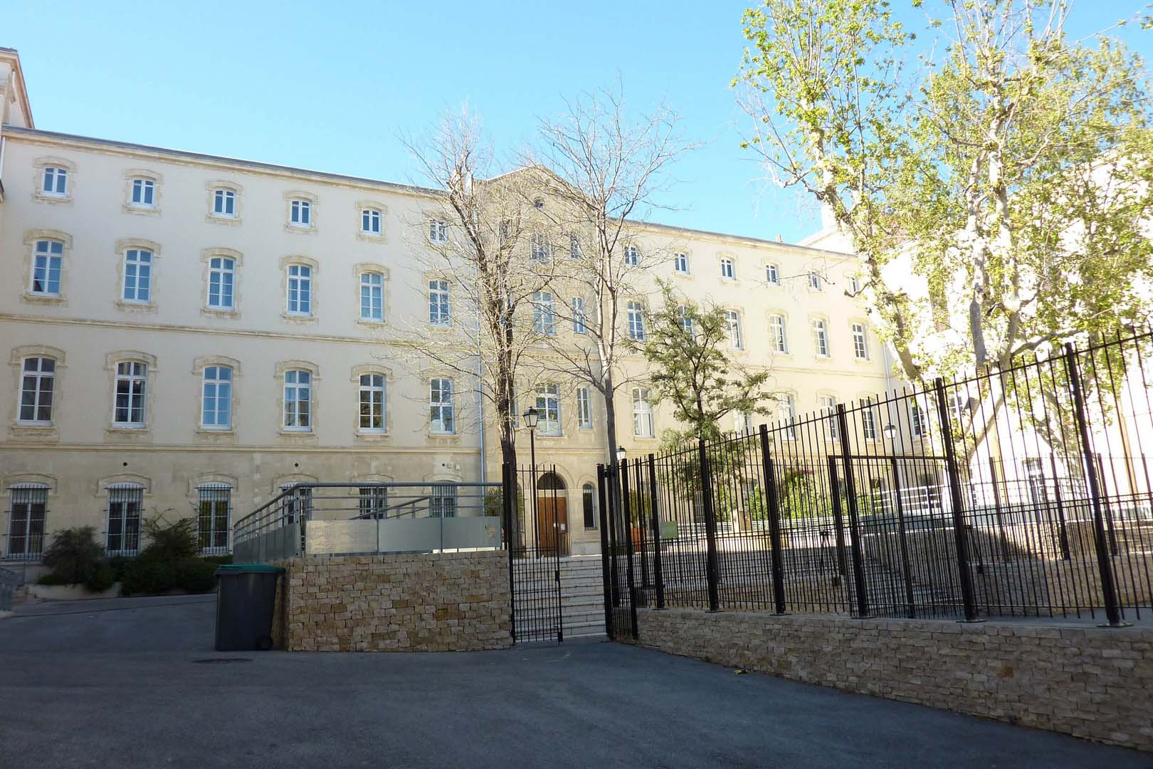 Cours d'honneur du nouveau Collège Longchamp, réhabilité entre 2007 et 2011.